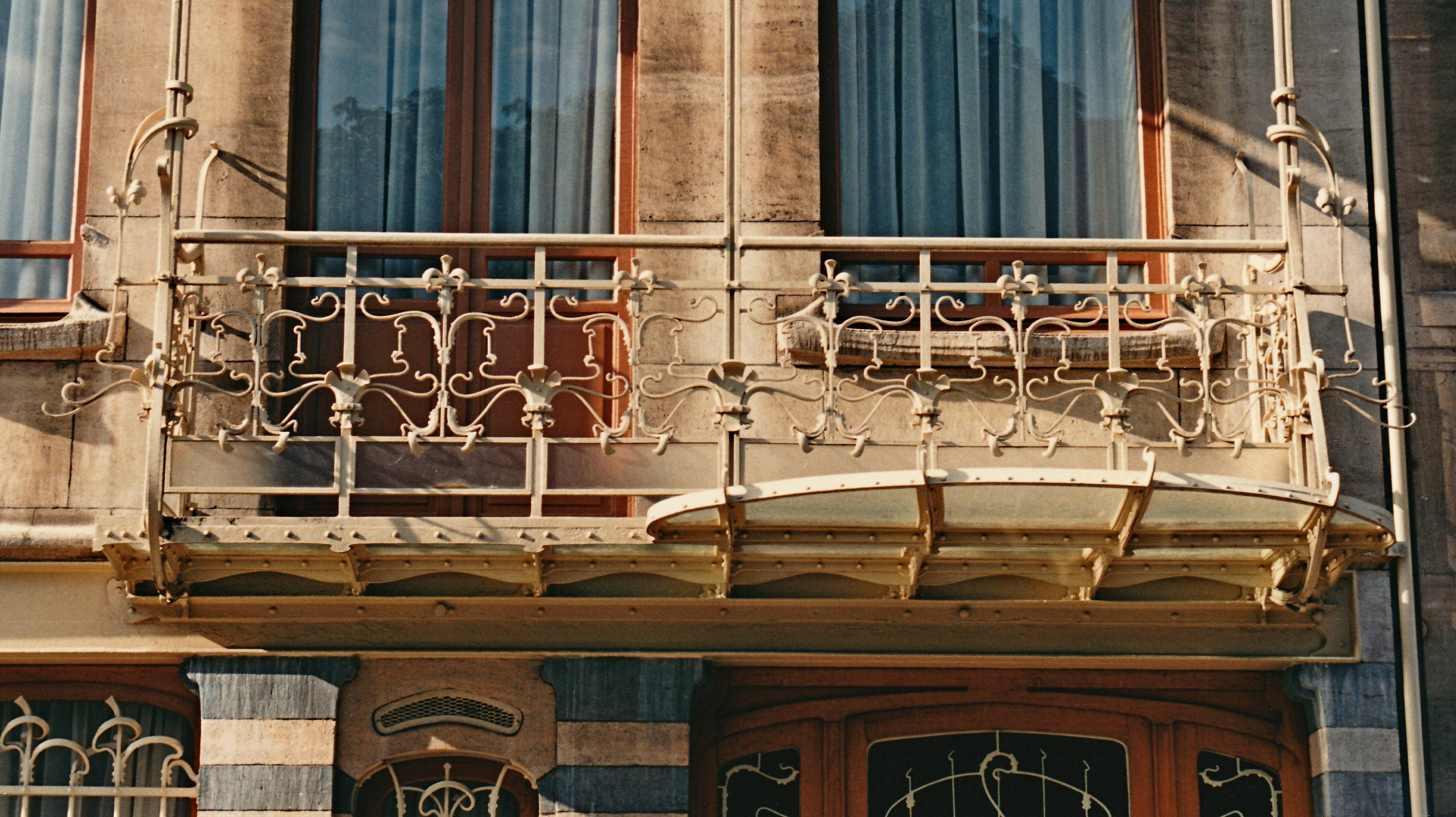 Belgique - Bruxelles - Maison Horta (Art nouveau, architecte Victor Horta, 1898-1901)